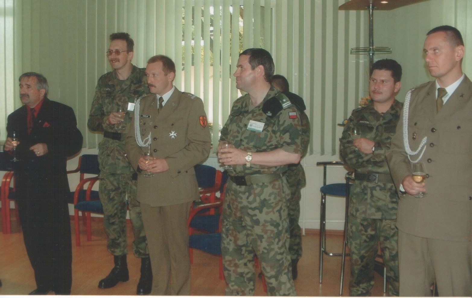 Stargard. Dariusz Parylak